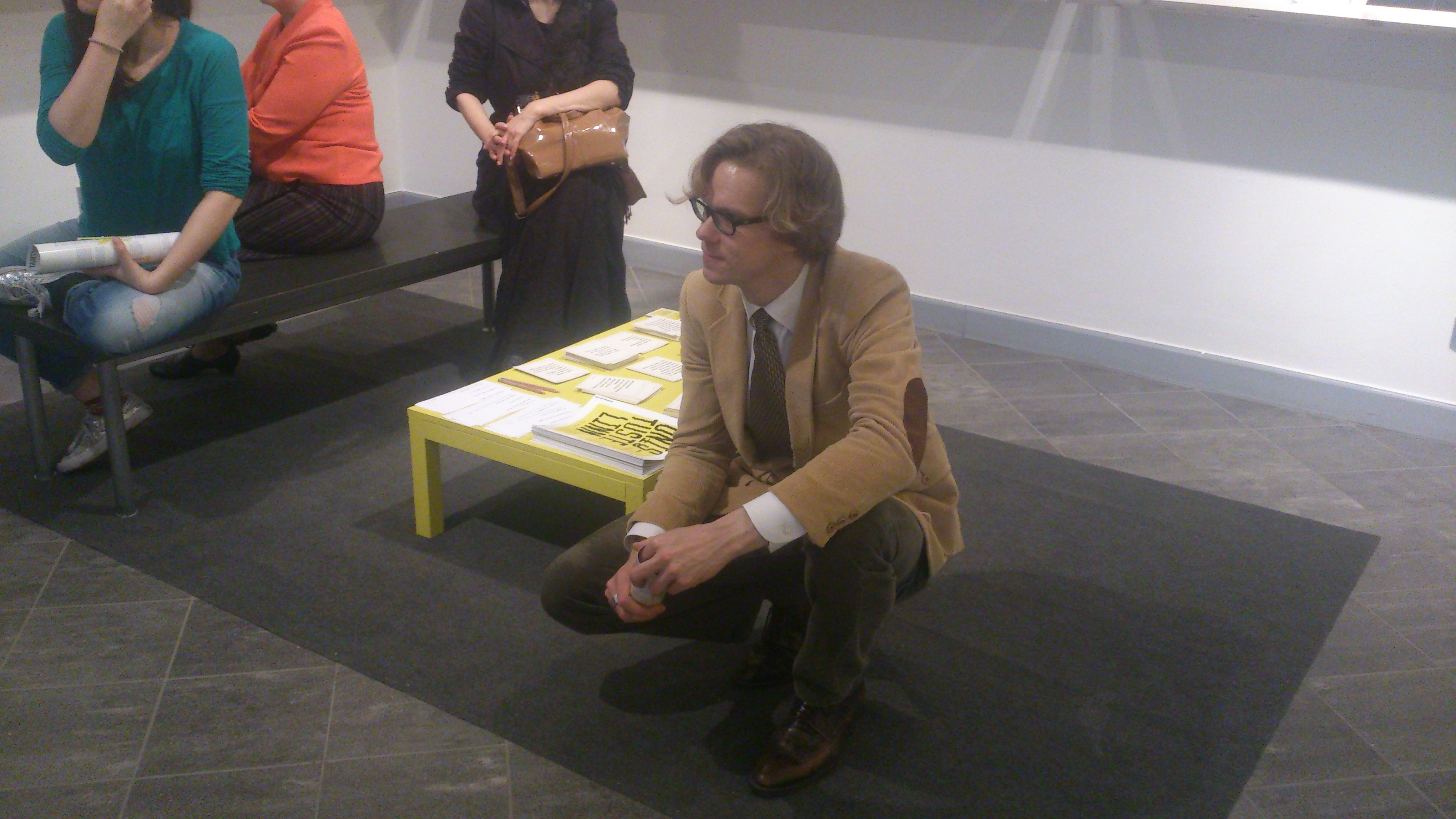 Indrek Grigor